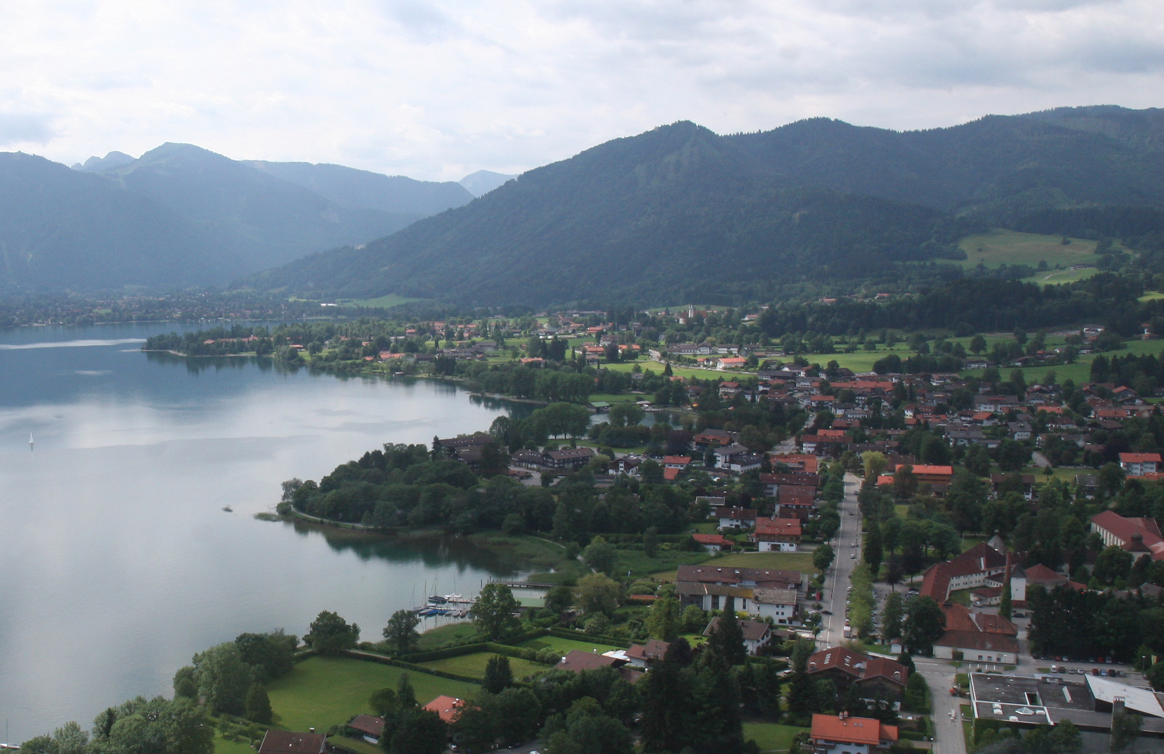 Luftaufnahme von Bad Wiessee mit Blick Richtung Süden